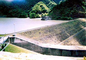 Dam